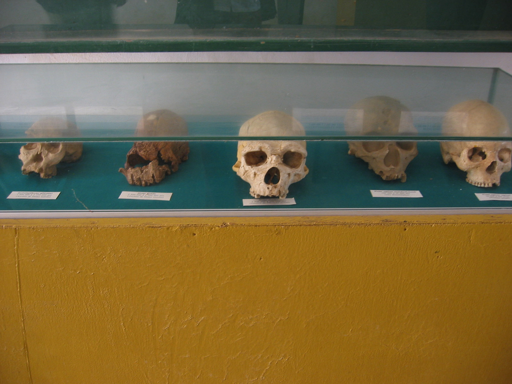 Collection protohistorique (crânes) au Musée historique du Sénégal à Gorée